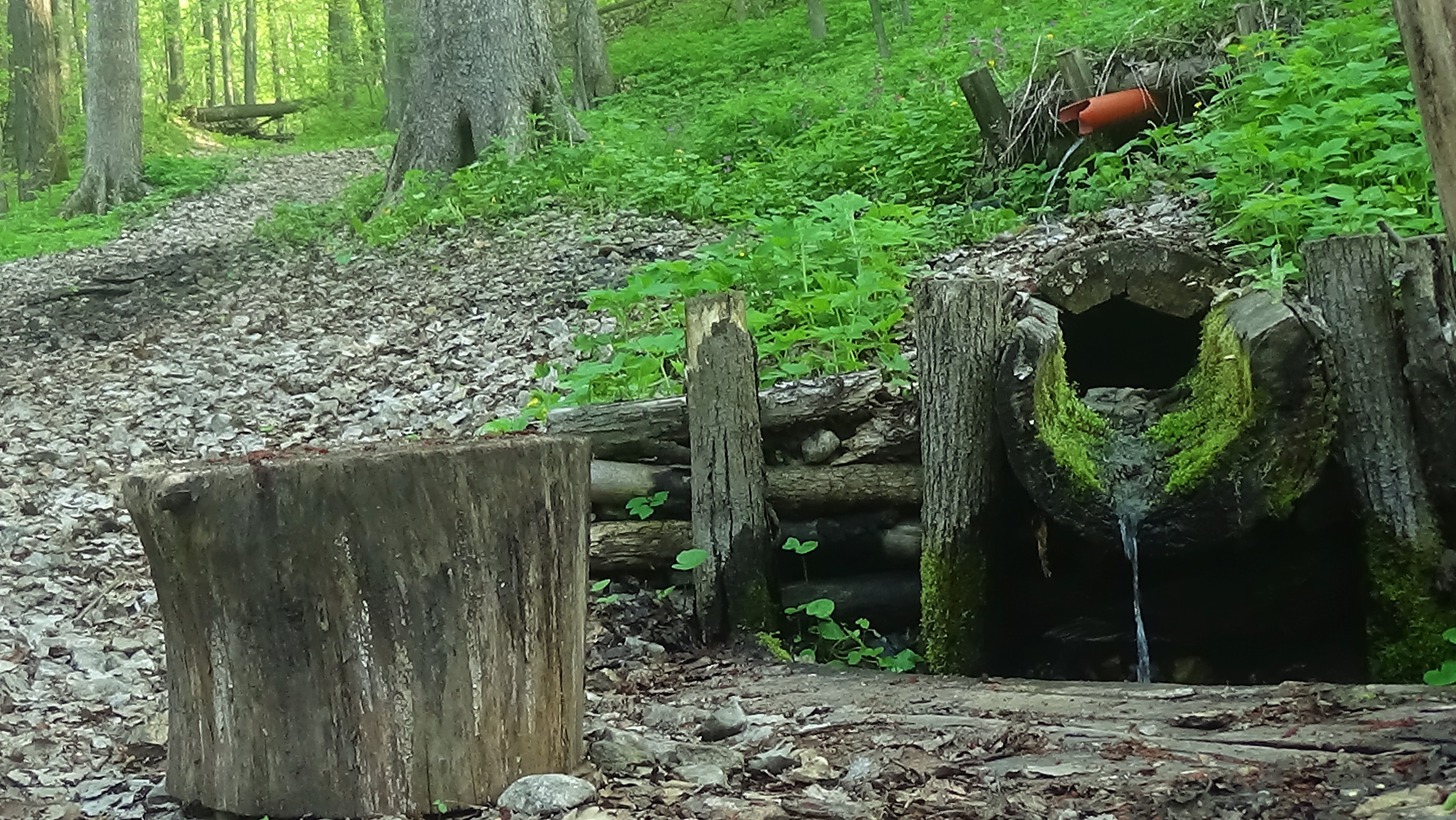 Поливенские родники - три источника гравитационного стока грунтовых вод. Вода слабоминеральная. Координаты: 54°24'45.65"N 48°22'10.9"E (Лес Вышскинская пристань). Святой источник Матроны Московской с купелью